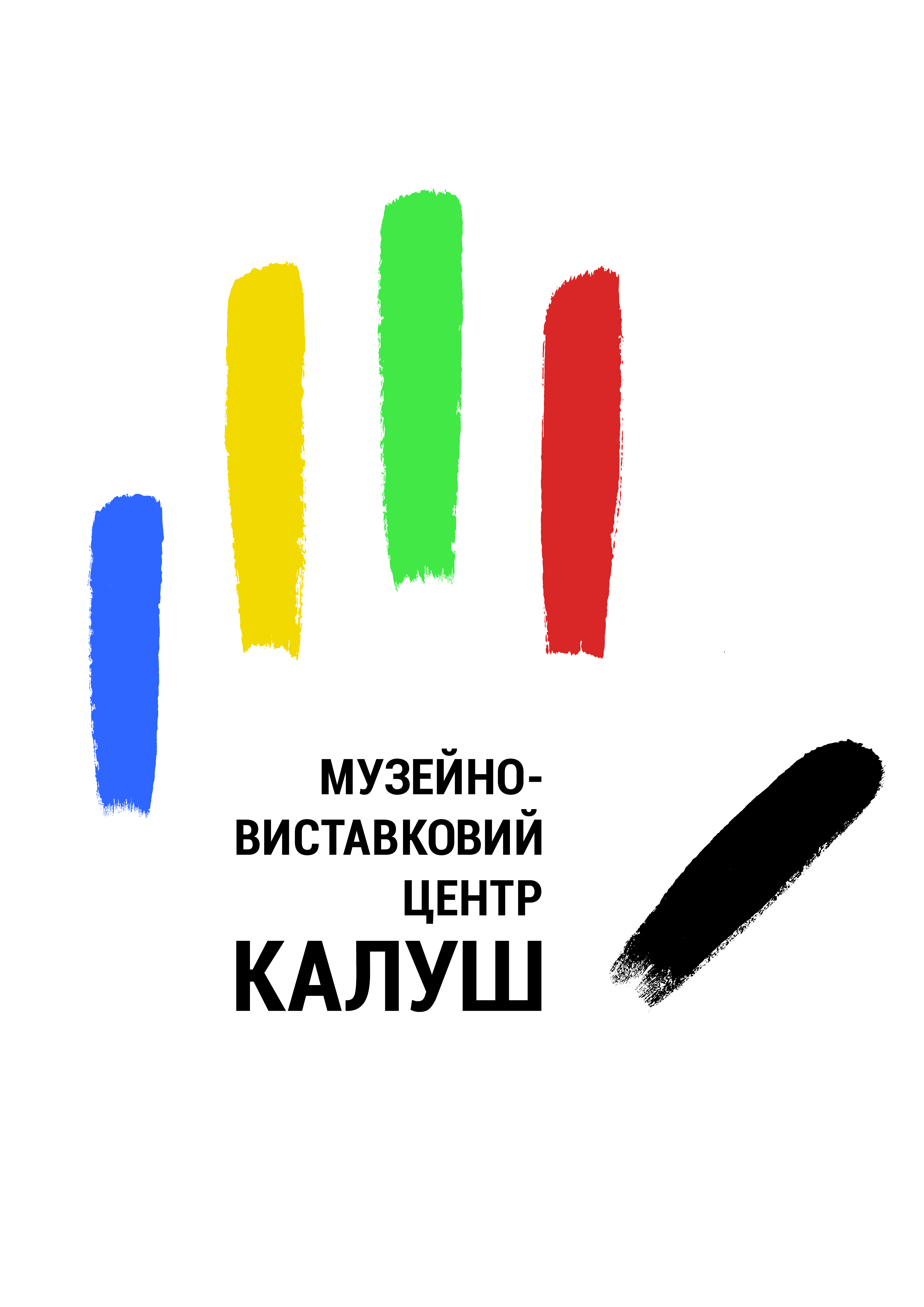 Візуальний стиль закладу створений Нікітою Пружко в межах проекту "Промузеум"